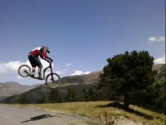 Patinete de downhill (descenso) Iron Cols de Gravity Scooters en el Bikepark Granvalira (Soldeu, Andorra).